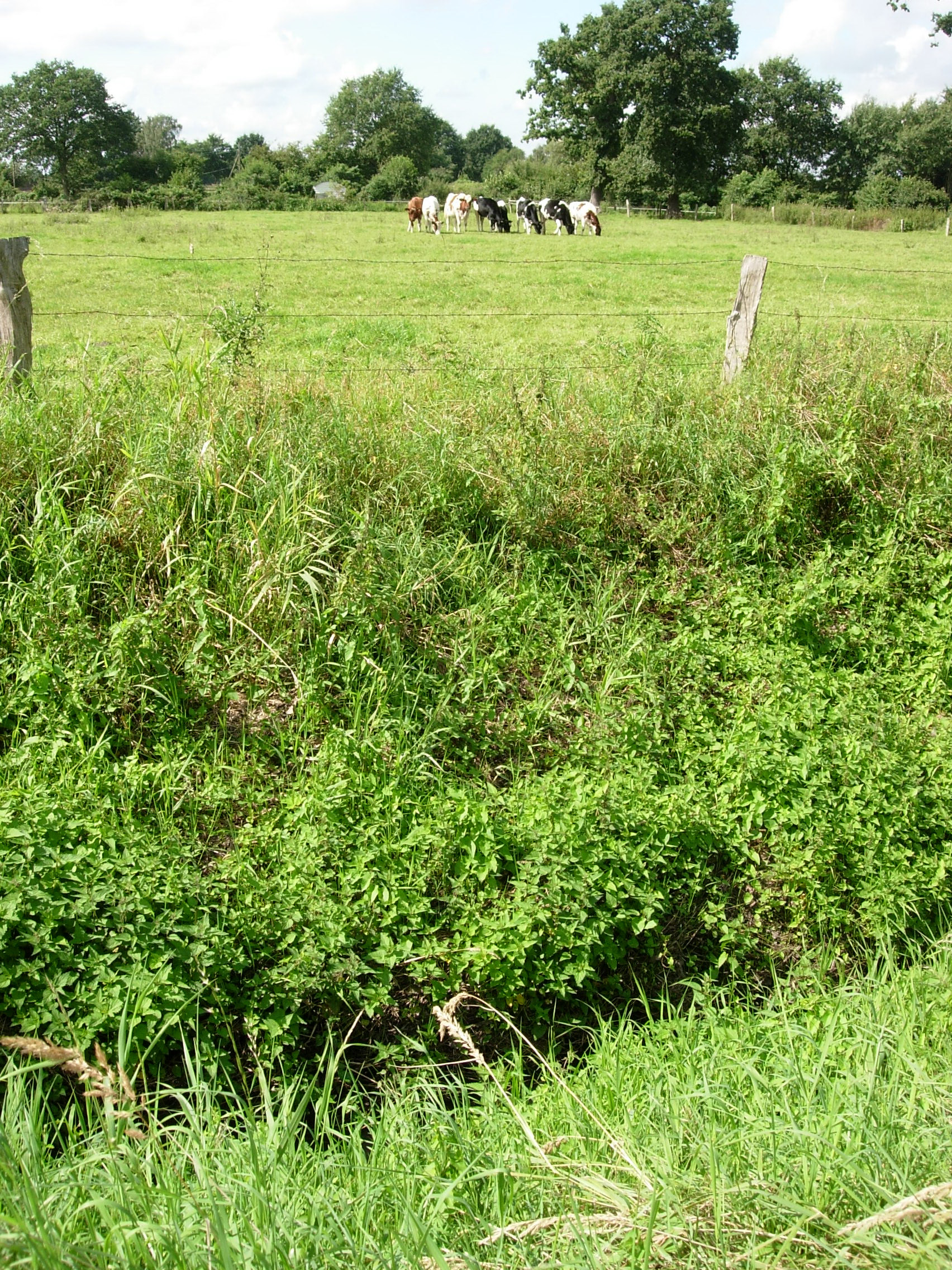 Oberlauf der Wedeler Au am Ellernholt